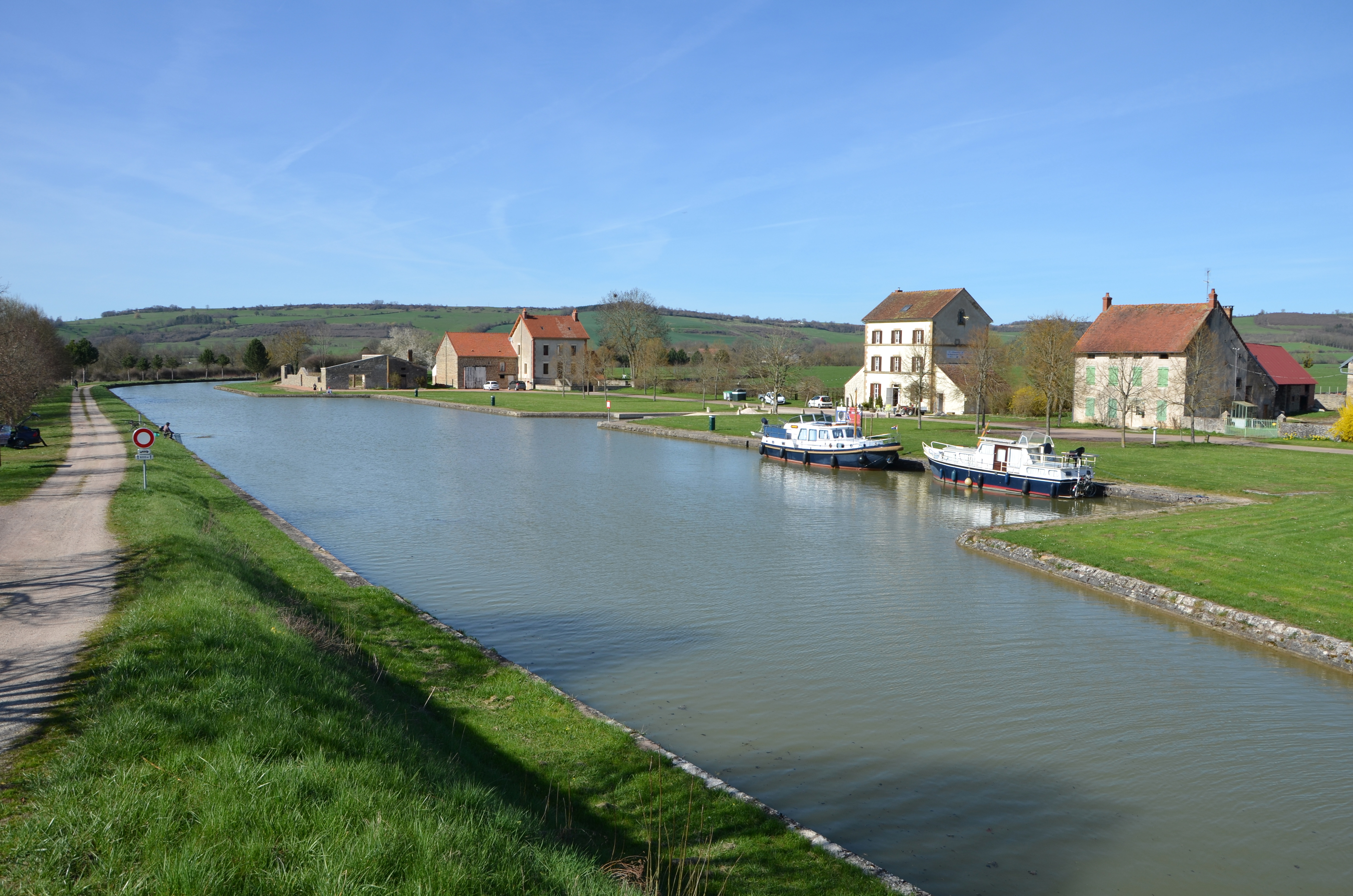 Pont-Royal sur le canal de Bourgogne, Clamerey, Côte d'Or, Bourgogne, France